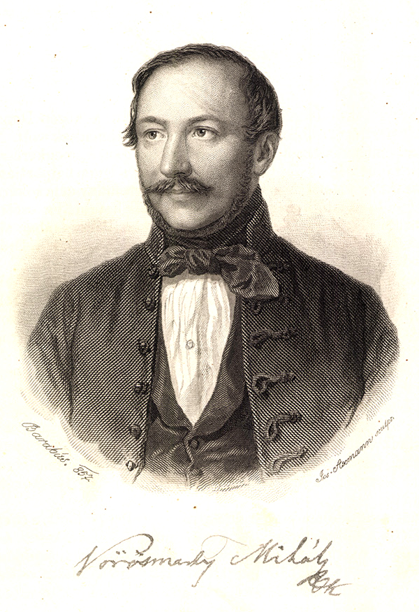 Mihály Vorosmarty